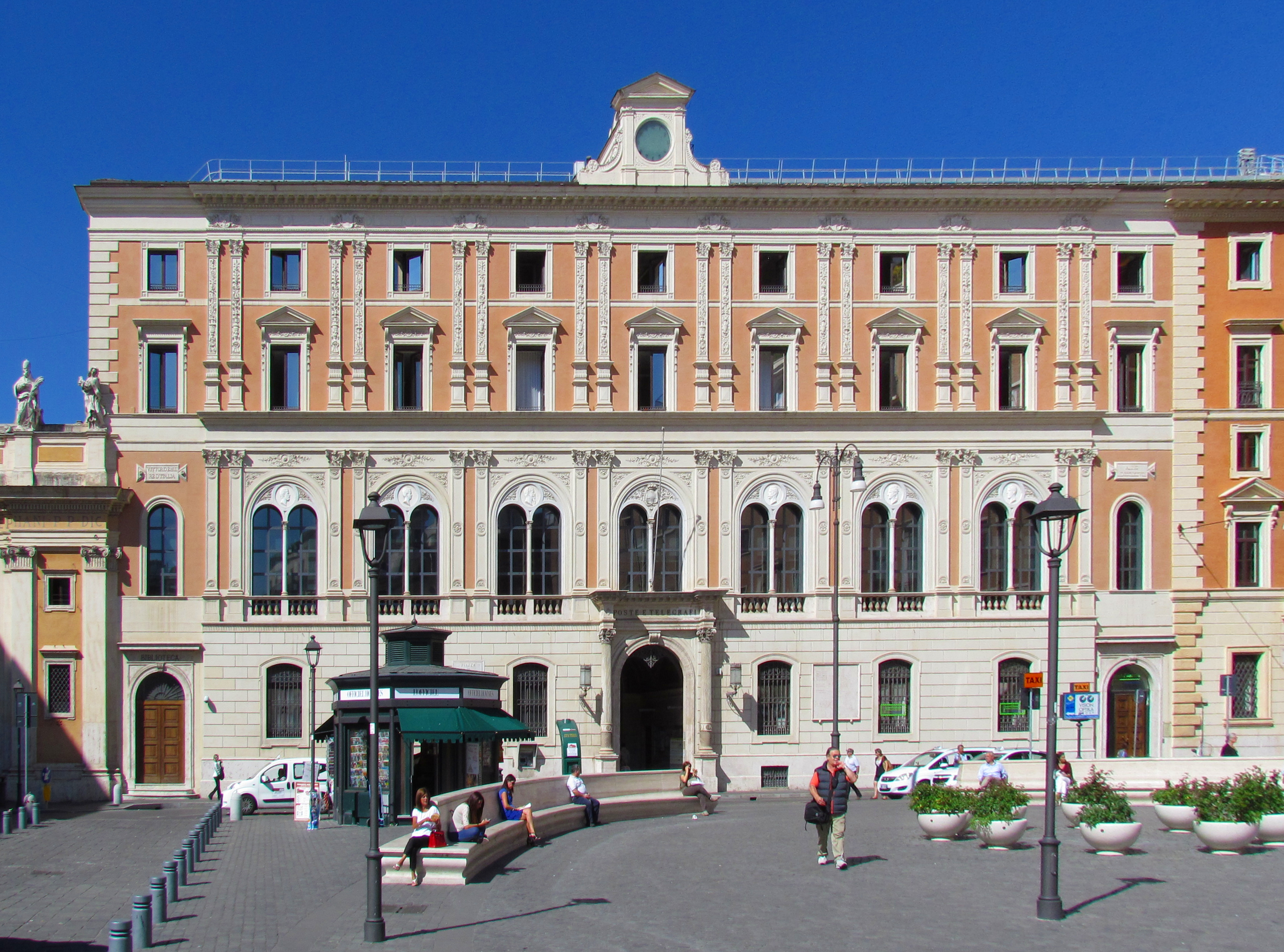 Bildinhalt: Postgebäude an der Nord-West-Seite der Piazza di San Silvestro in Rom Aufnahmeort: Rom, Italien